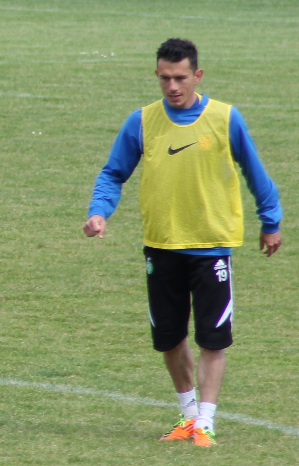 Christophe Landrin lors d'un entraînement à Castelmaurou, pour son diplôme d’entraîneur.